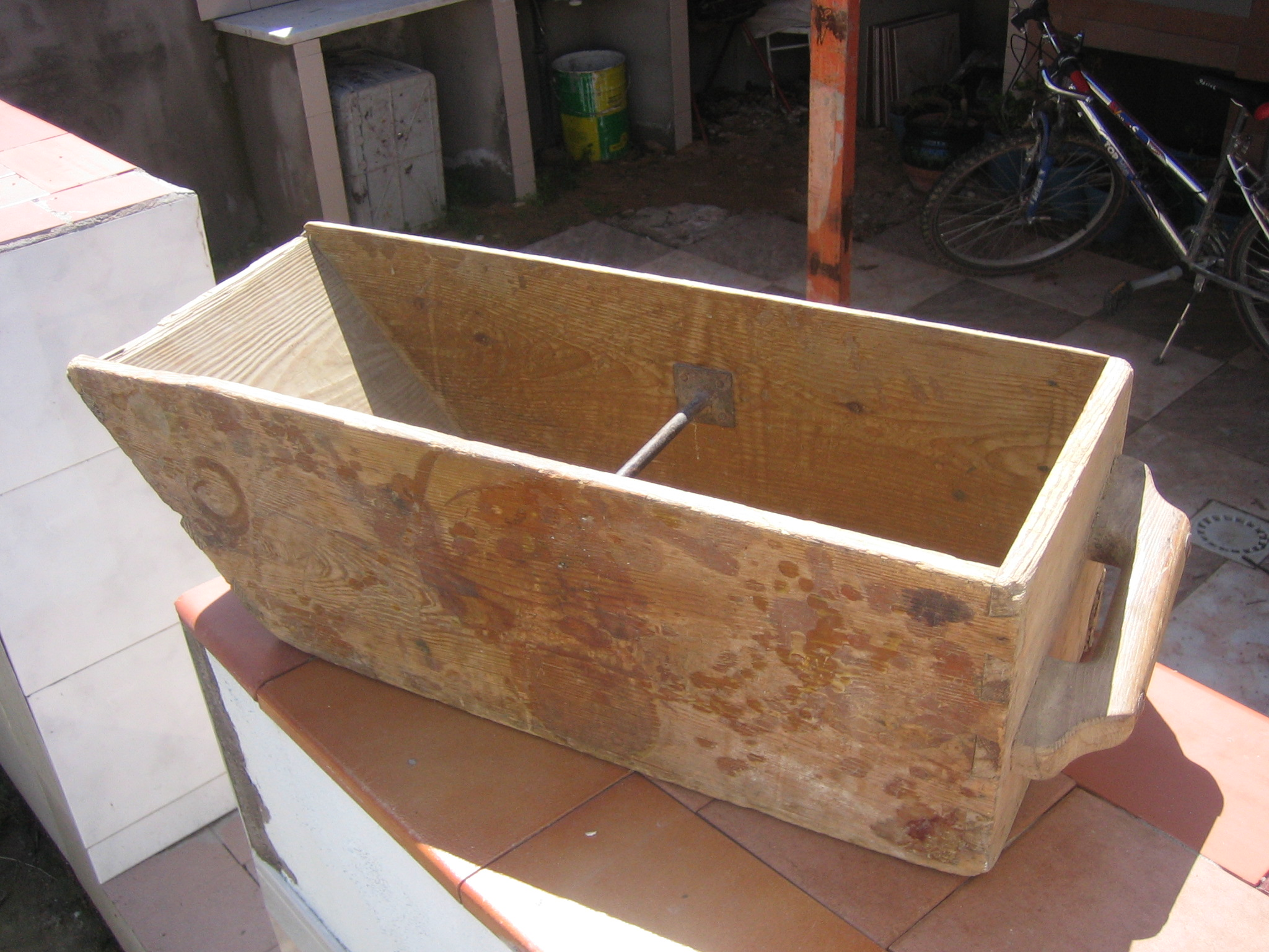 Contendor de medida de grano de media fanega, Cuenca, España.